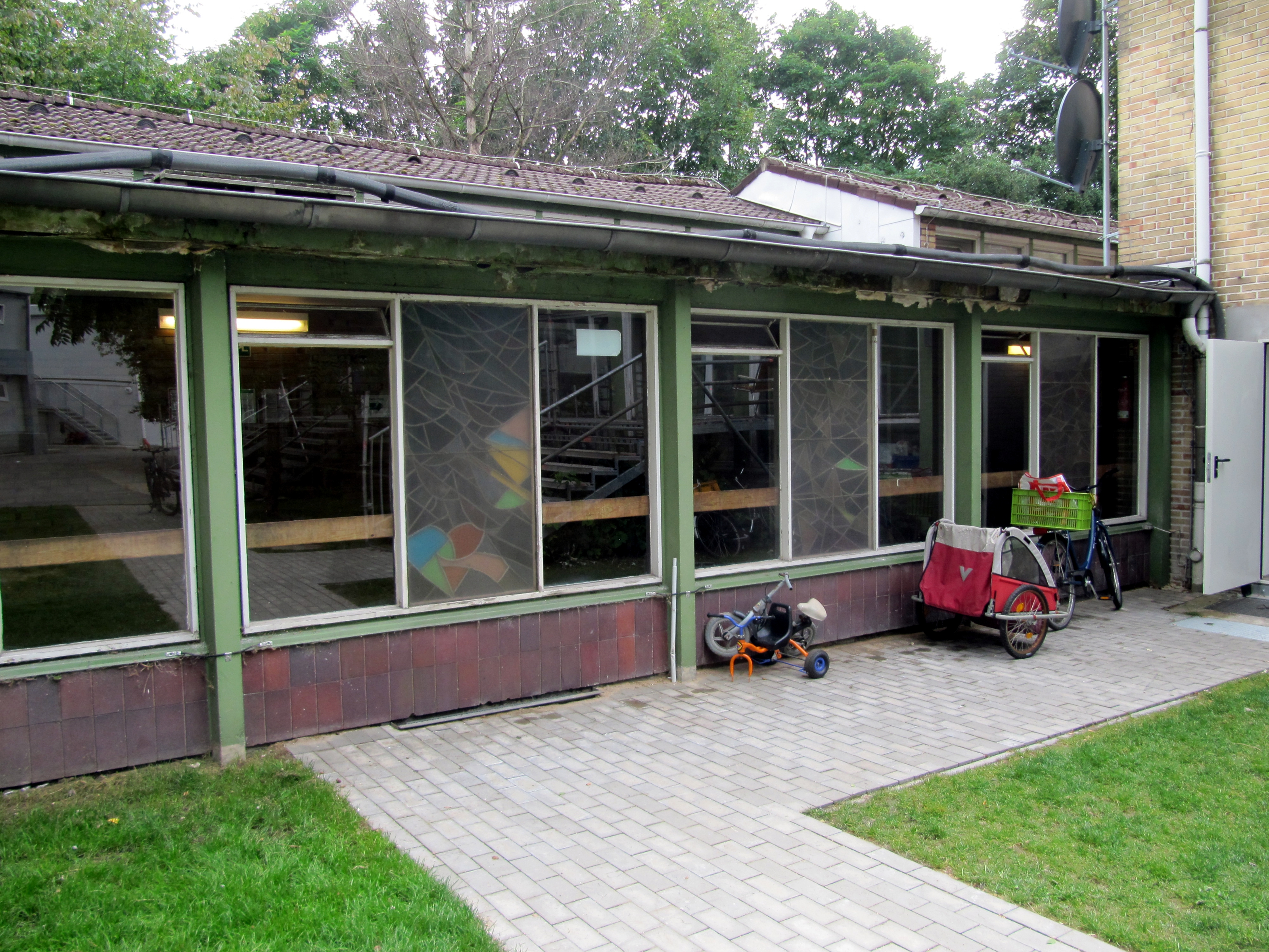 Spangenberg-Mosaikfenster Schule Weddestraße (August 2016)